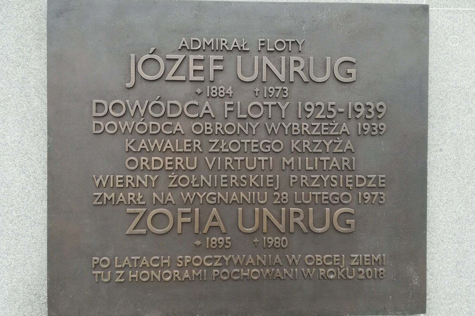 Cmentarz Marynarki Wojennej_Kwatera Pamięci_Admirał_floty_Unrug